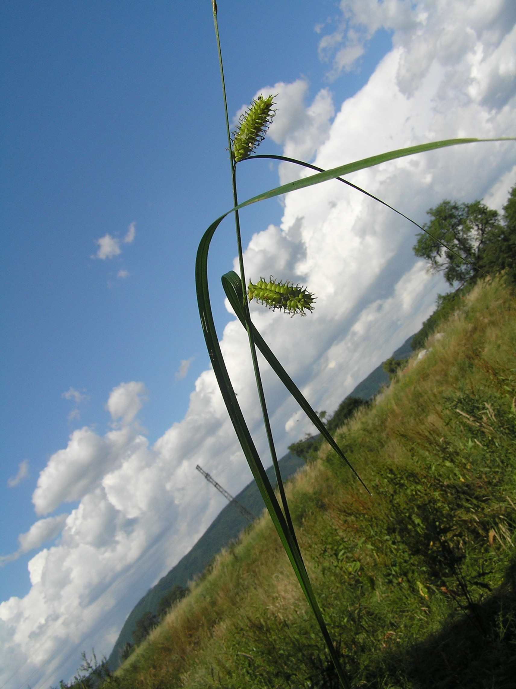 Carex vesicaria, Jezernice, Moravia, Czech Republic